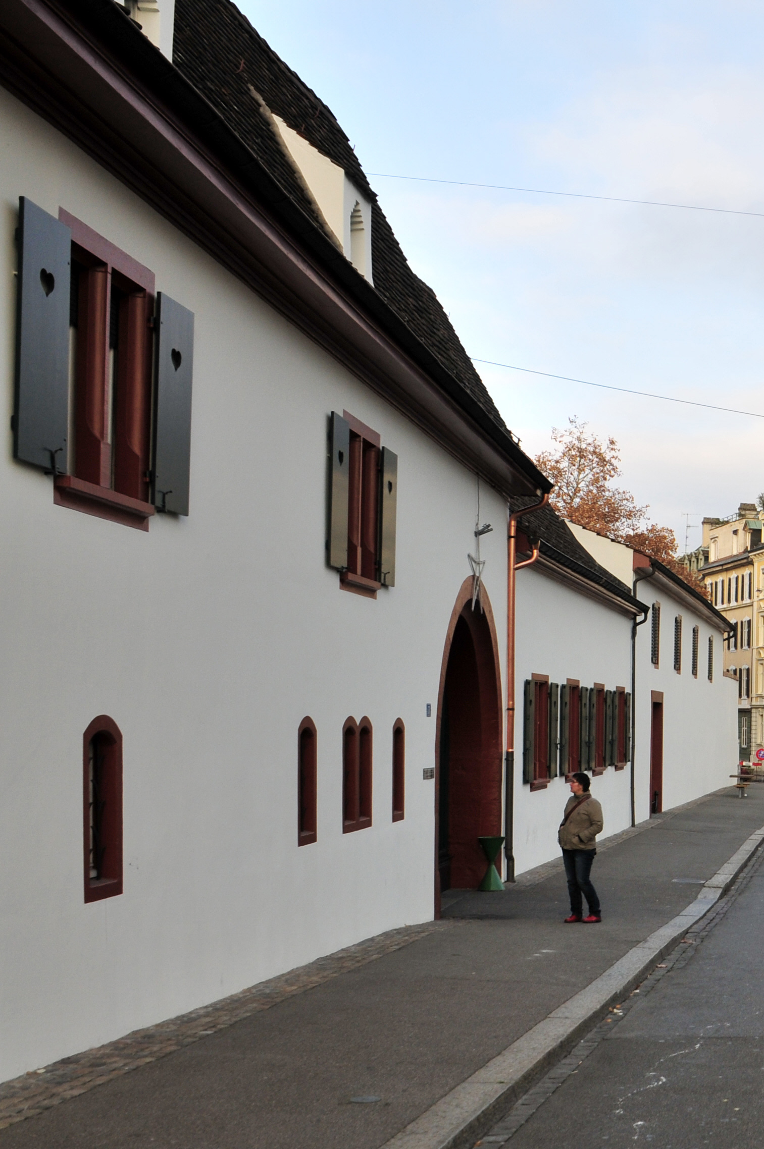 Basel, Theodorskirchplatz 7, ehemalige Kartause St. Margarethental